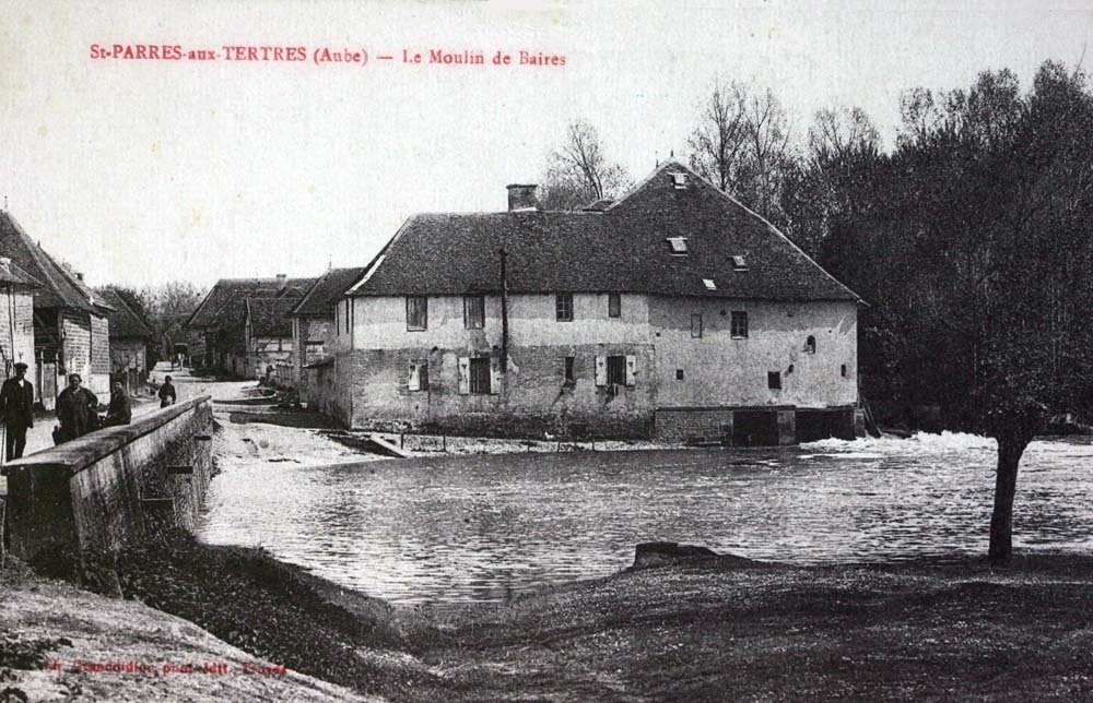 vue, à Saint-Parres-Aux-Tertres du moulin Baire